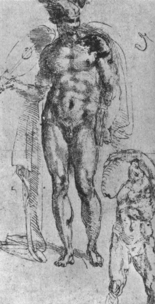 Michelangelo, studio forse per il cupido-apollo, louvre 2